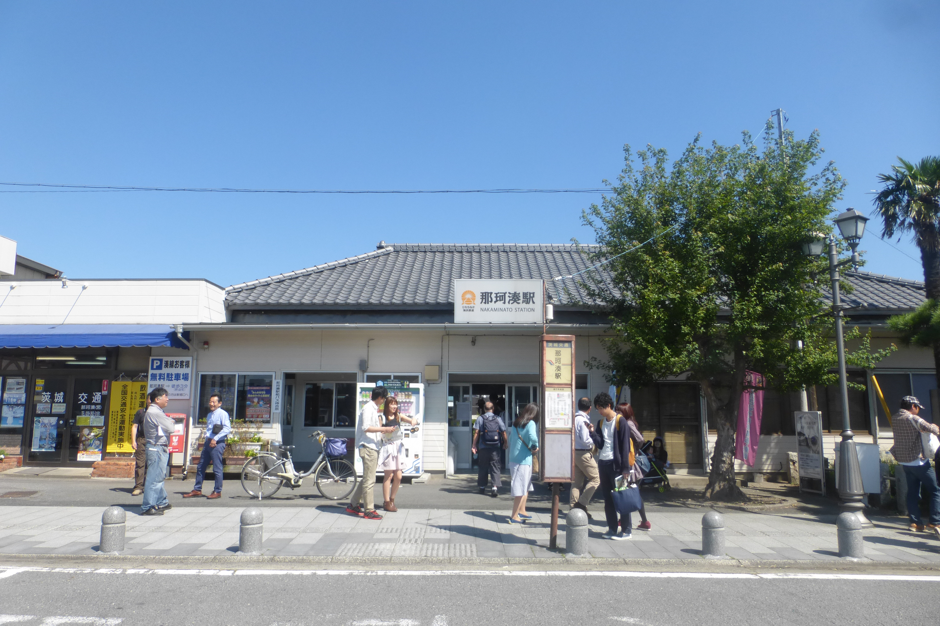 那珂湊駅 (Nakaminato Station)